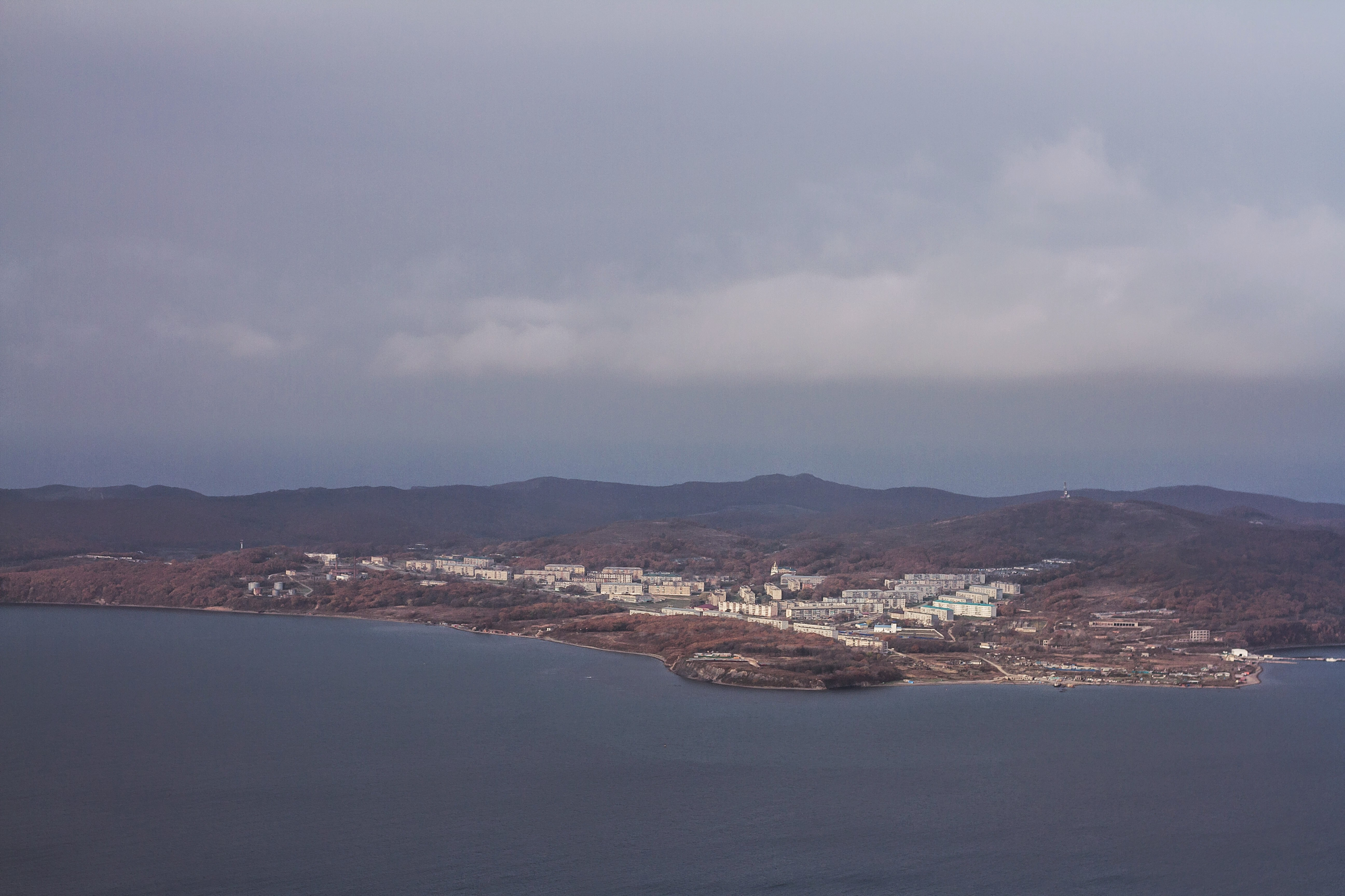 Посёлок Дунай с горы Старцева (Приморский край)